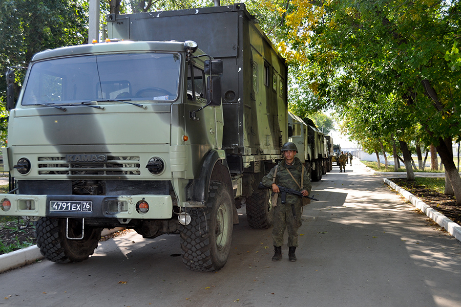 Приведение в полную степень боевой готовности 23-й отдельной гвардейской мотострелковой бригады ЦВО, задействованной во внезапной проверке боеготовности (г. Самара)